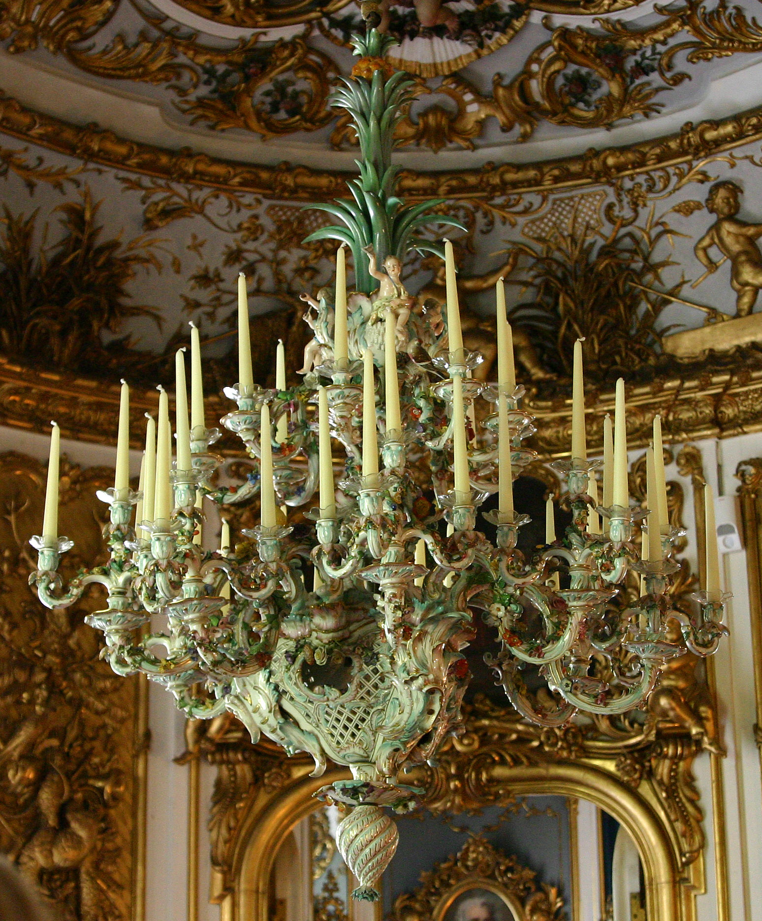 Der Porzellan-Kronleuchter befindet sich im Speisezimmer des Schlosses Linderhof. Er wurde von Ludwig II. als Einzelstück in Auftrag gegeben und zur Erbauungszeit des Schlosses in der 2. Hälfte des 19. Jahrhunderts in der Porzellanmanufaktur Meissen hergestellt. Als Vorbild dienten Leuchter aus der Königlichen Porzellan Manufaktur Berlin die im 18. Jahrhundert gefertigt wurden.